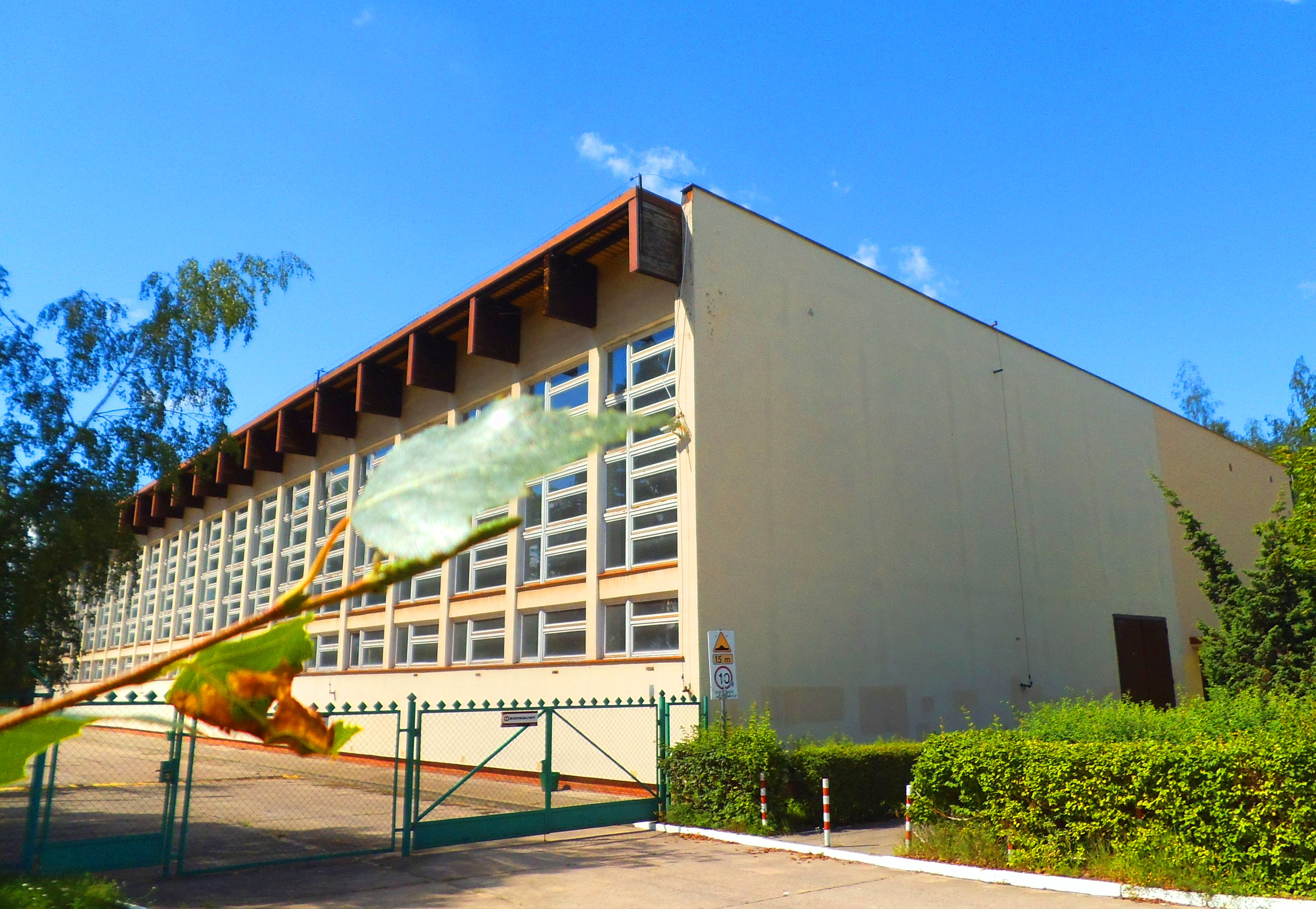 Sala gimnastyczna Zespołu Szkół Samochodowych w Toruniu